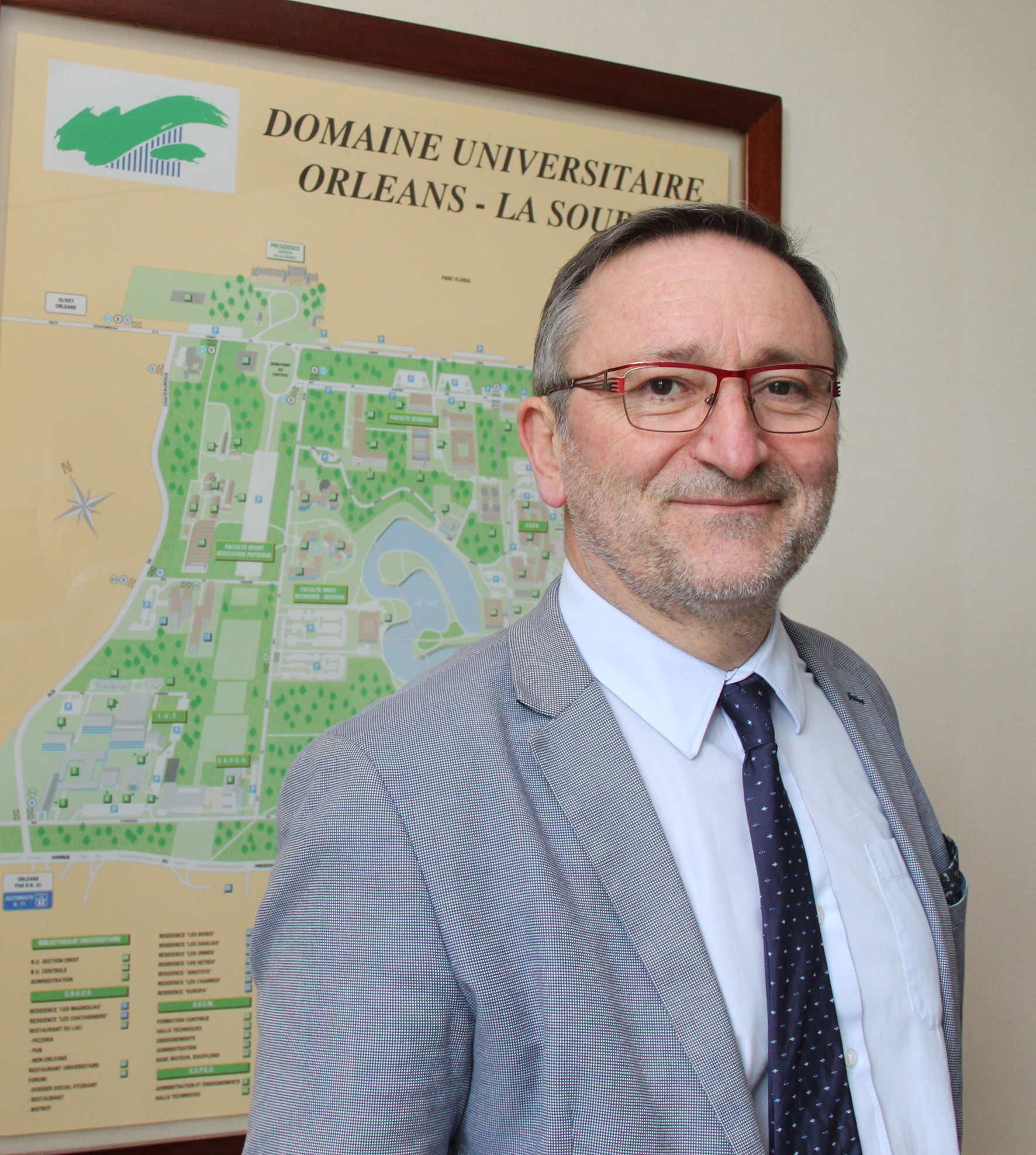 Photographie président université d'Orléans (2016-2020)